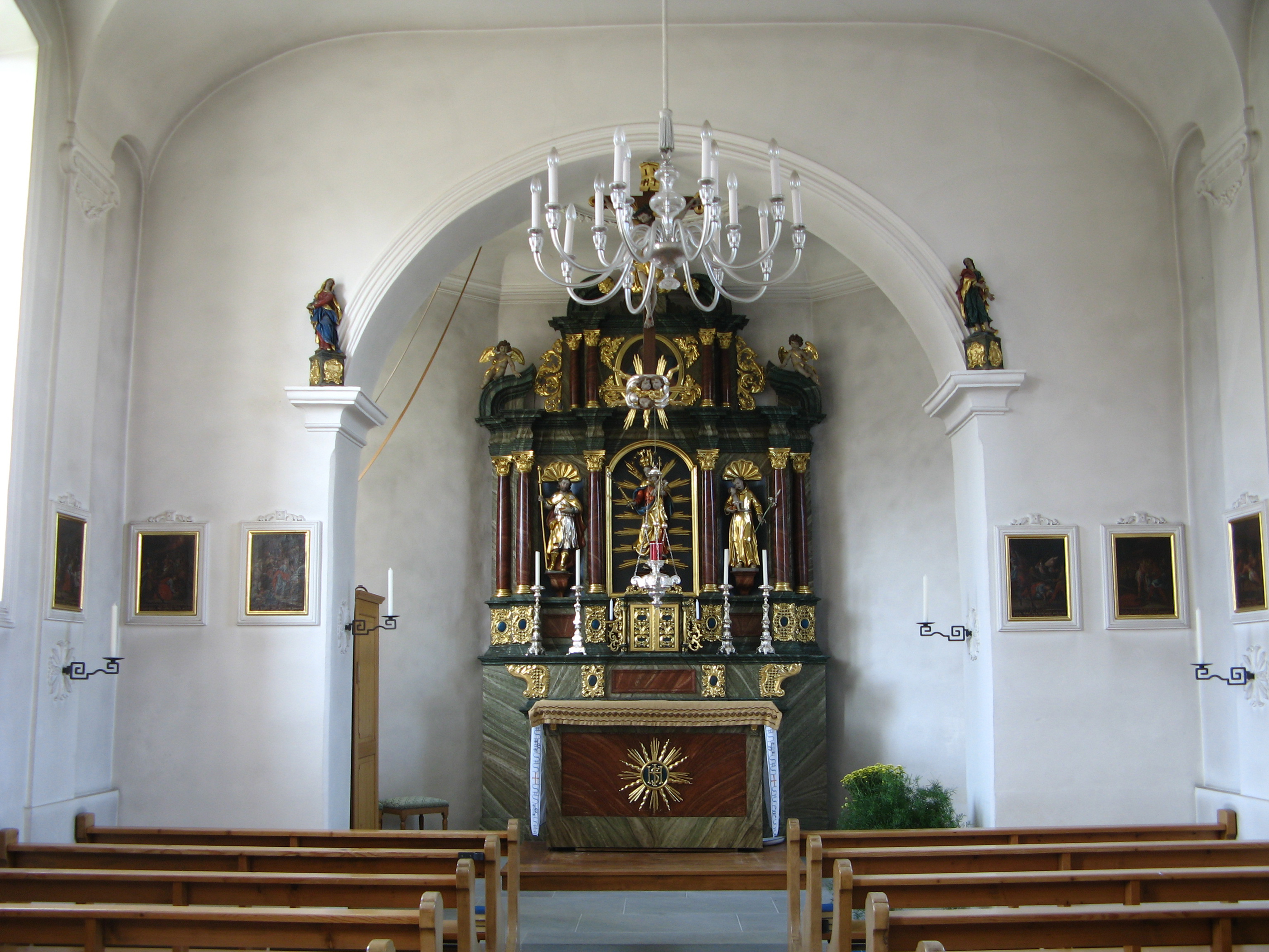 Kapelle St. Jost und Antonius von Padua in Alikon bei Sins, Innenansicht